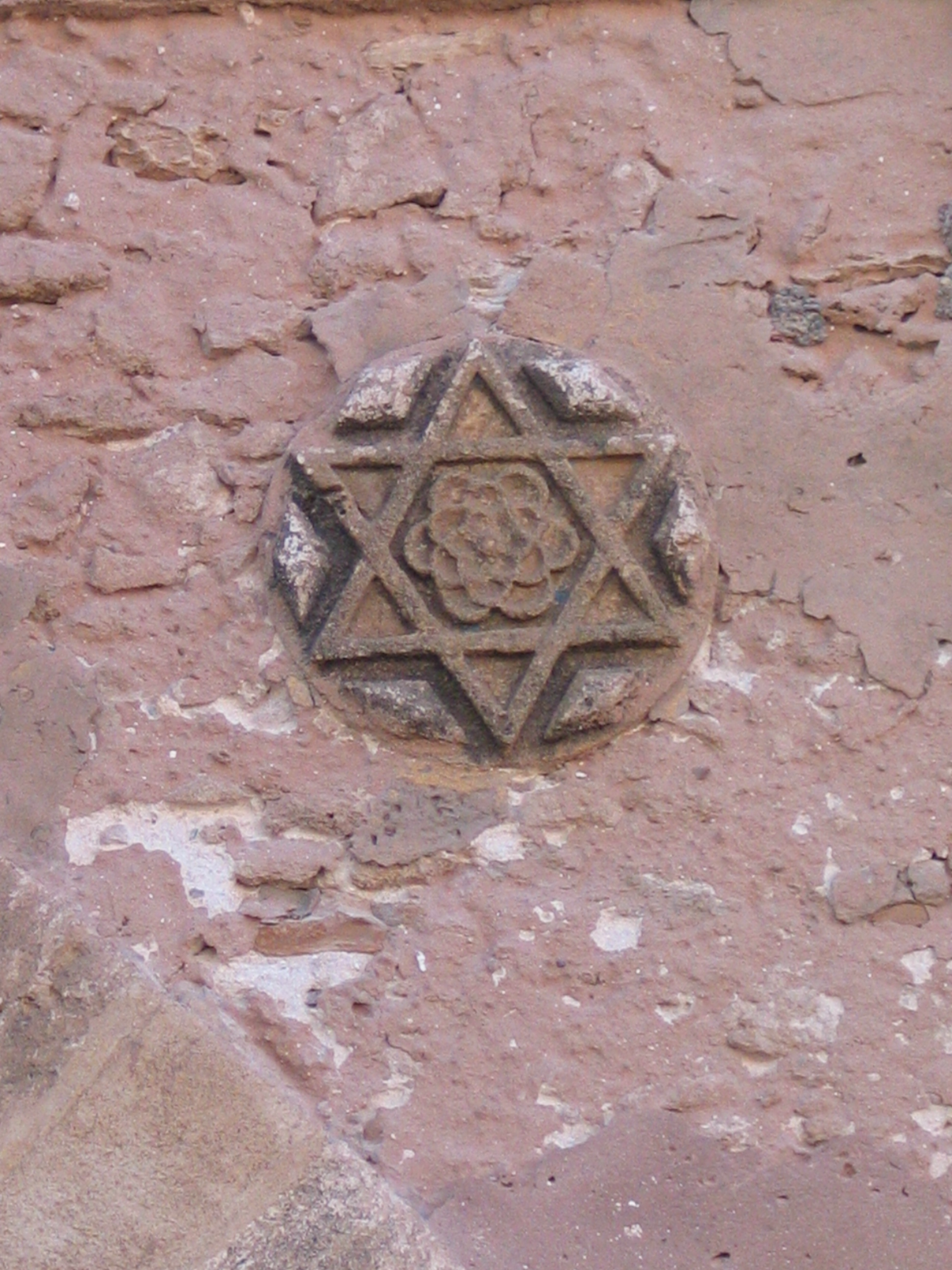 Essaouira (Maroc), l'ancien quartier juif